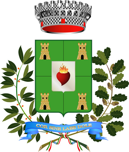 Piemontèis: Corato.